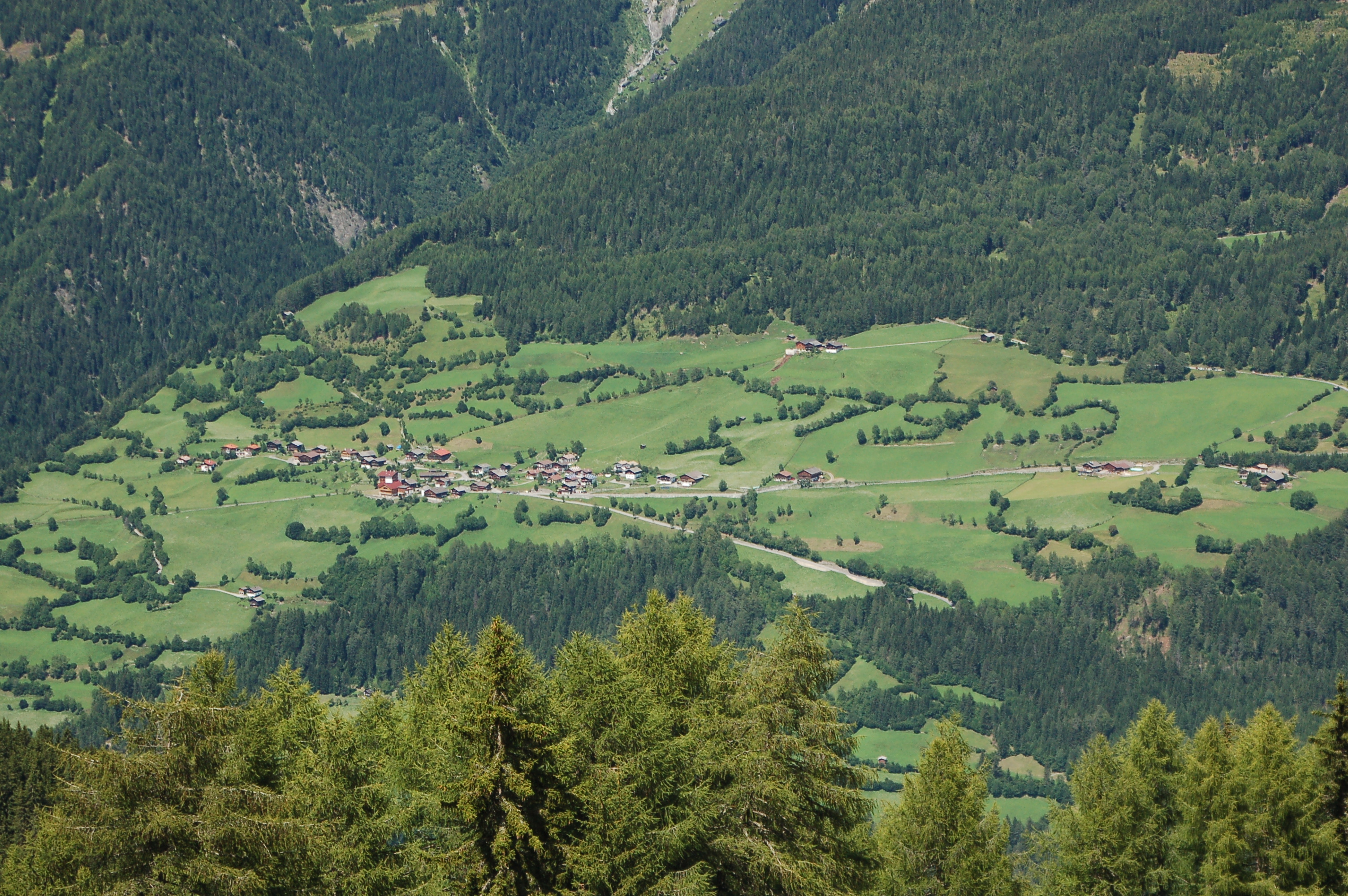 Die Fraktion Zedlach (Gemeinde Matrei in Osttirol) gesehn von Süden vom Weg zur Zunigalm